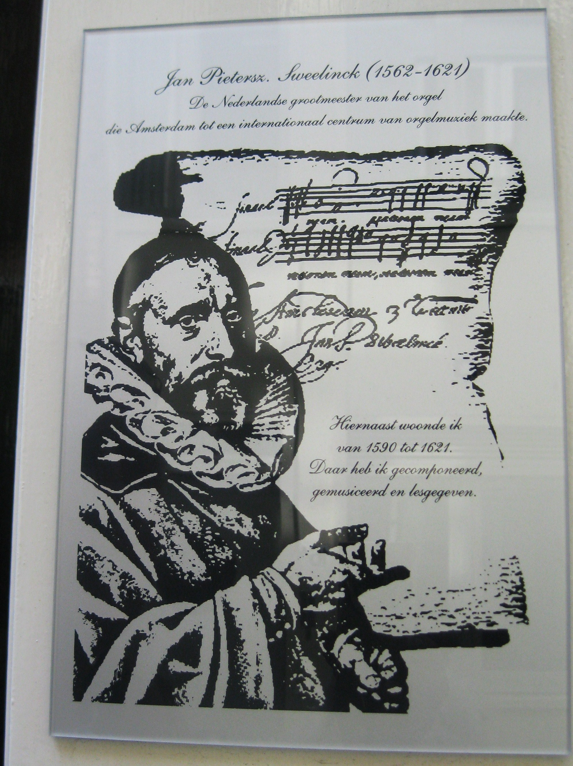 Naambordje Jan Pietersz. Sweelinck op Koestraat 13, hij wijst naar zijn woonhuis Koestraat 15 in Amsterdam. Geplaatst in september 2013. Portret gemaakt door Joan Muller in 1624.